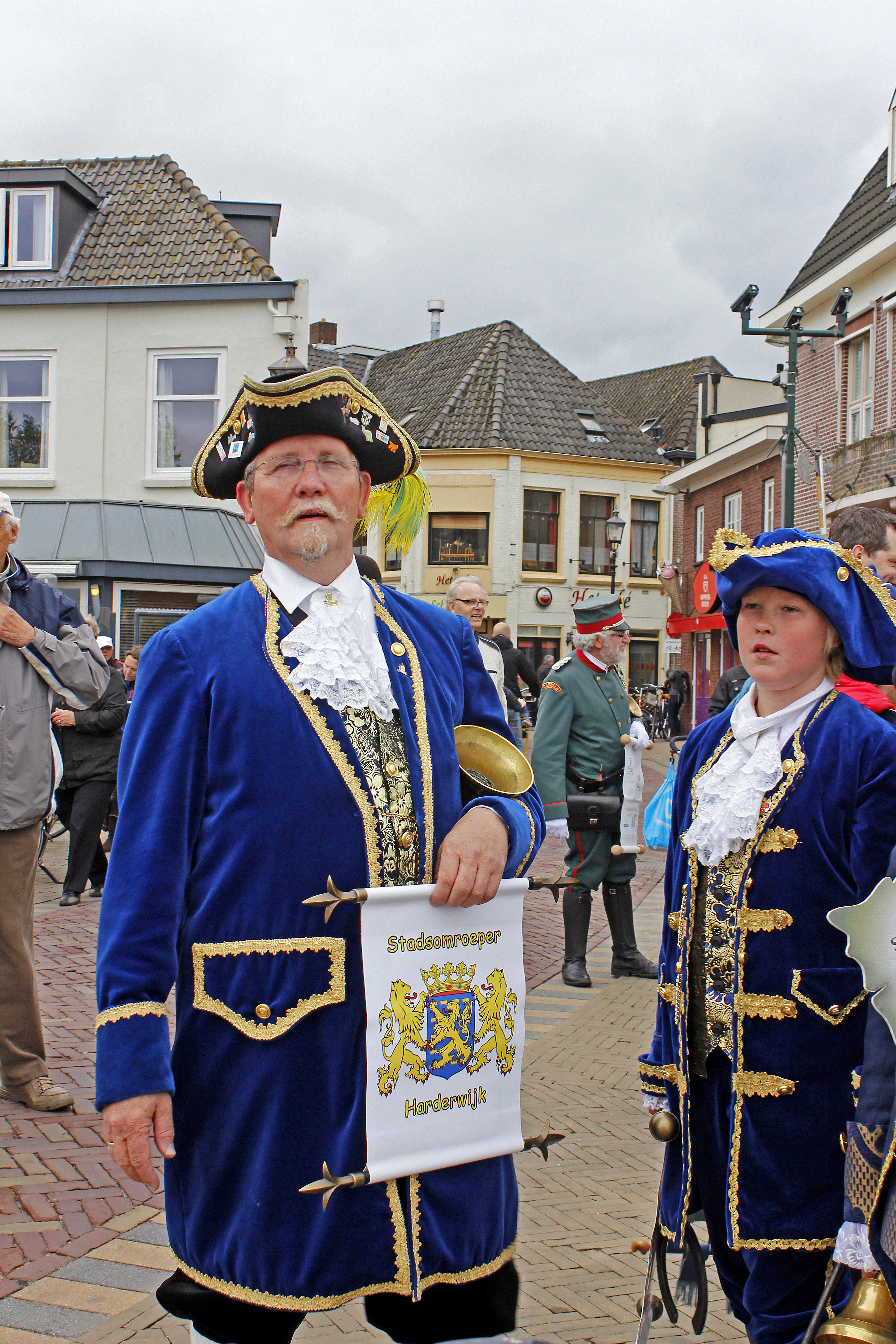 Frans en Niek de jeugdomroepers